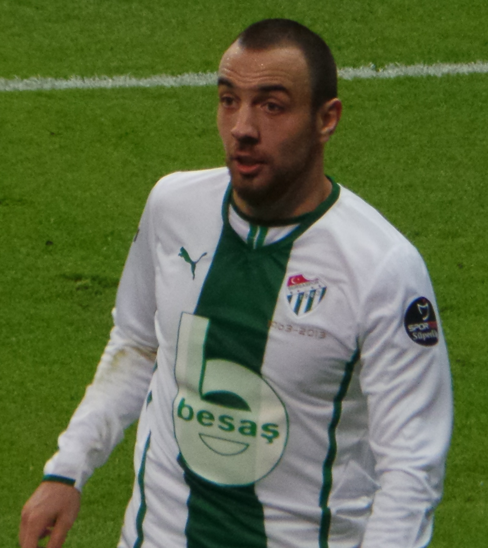 Sercan Yıldırım playing vs Galatasaray